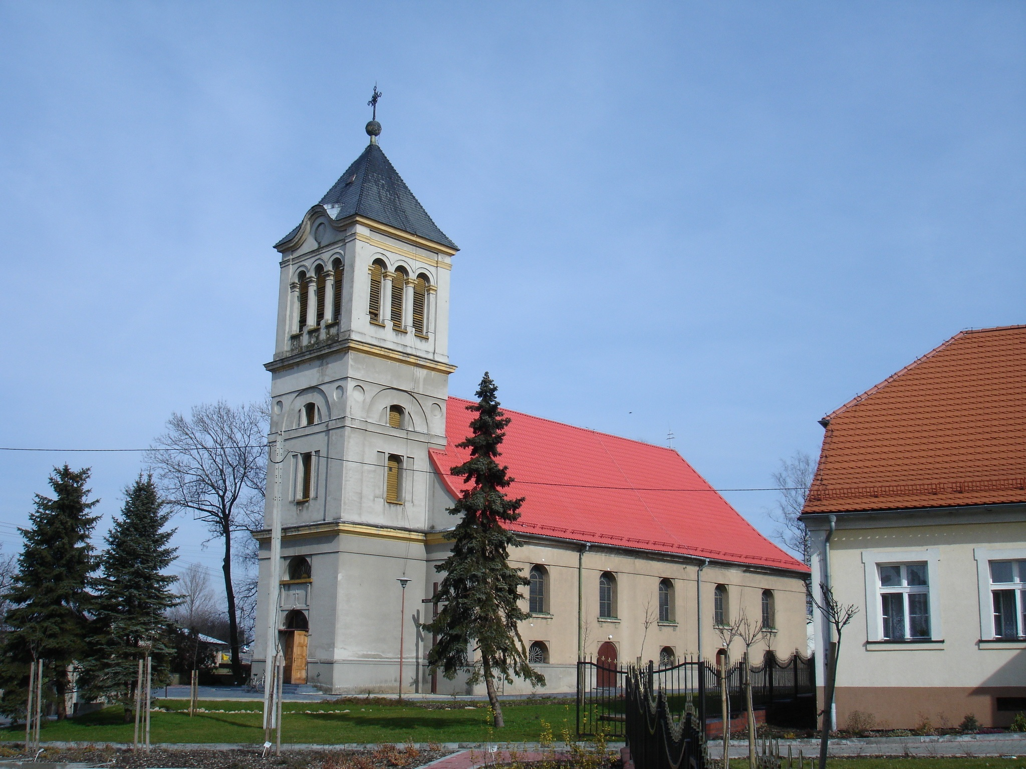 Pawonków latin church